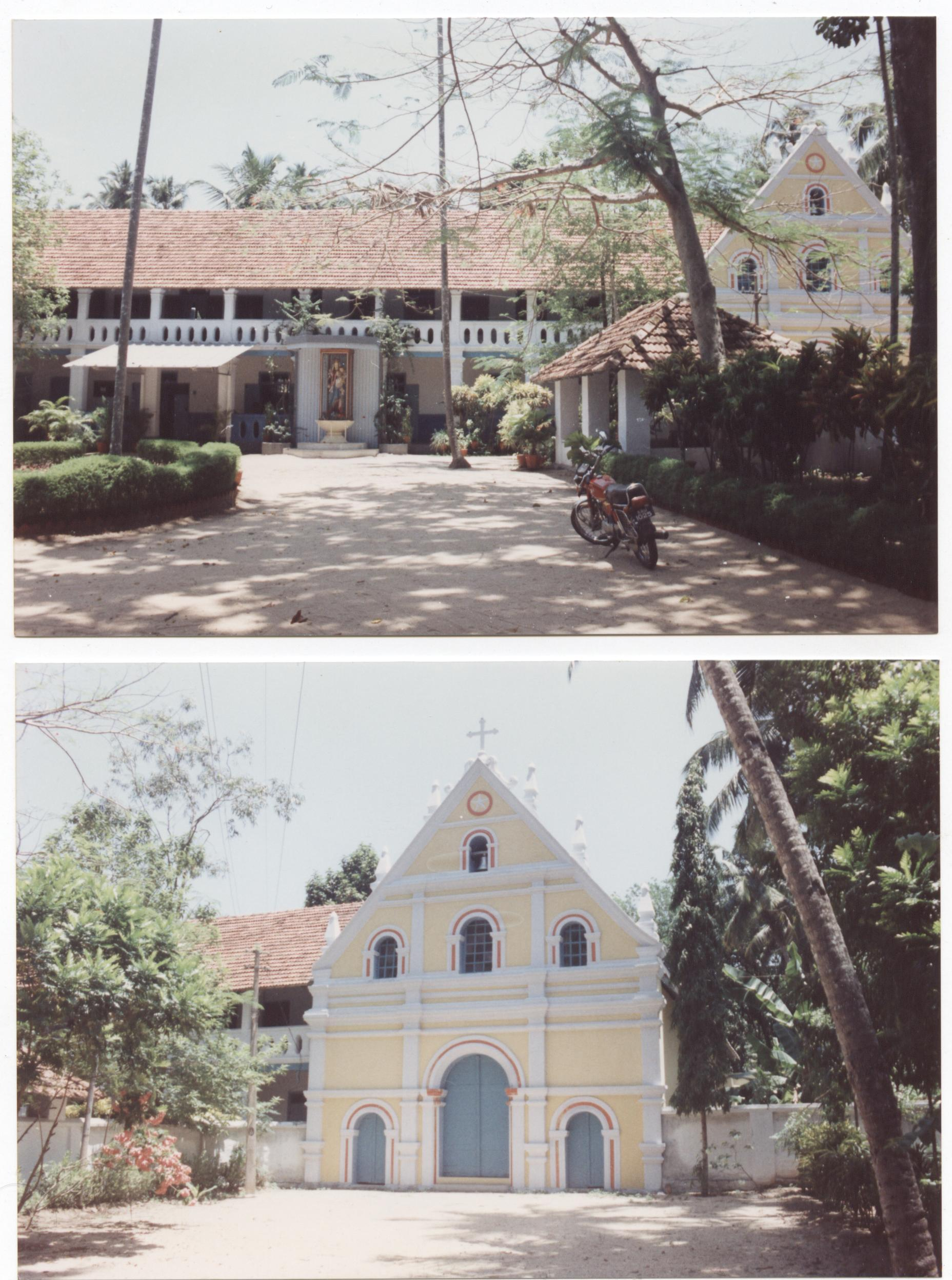 Bischofshaus in Quilon